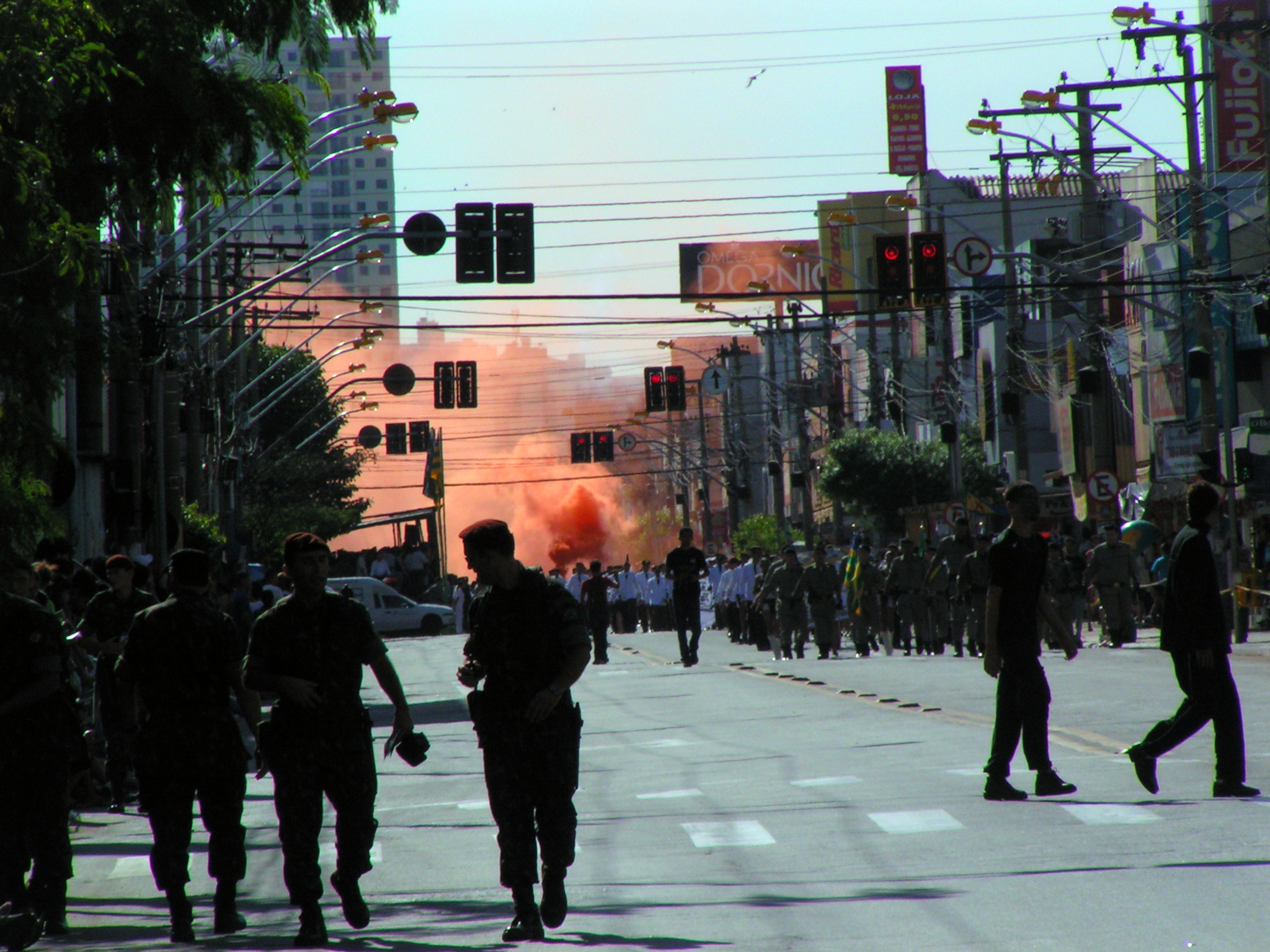 Comemoração do aniversário de Goiânia na Avenida 24 de Outubro, em Campinas.